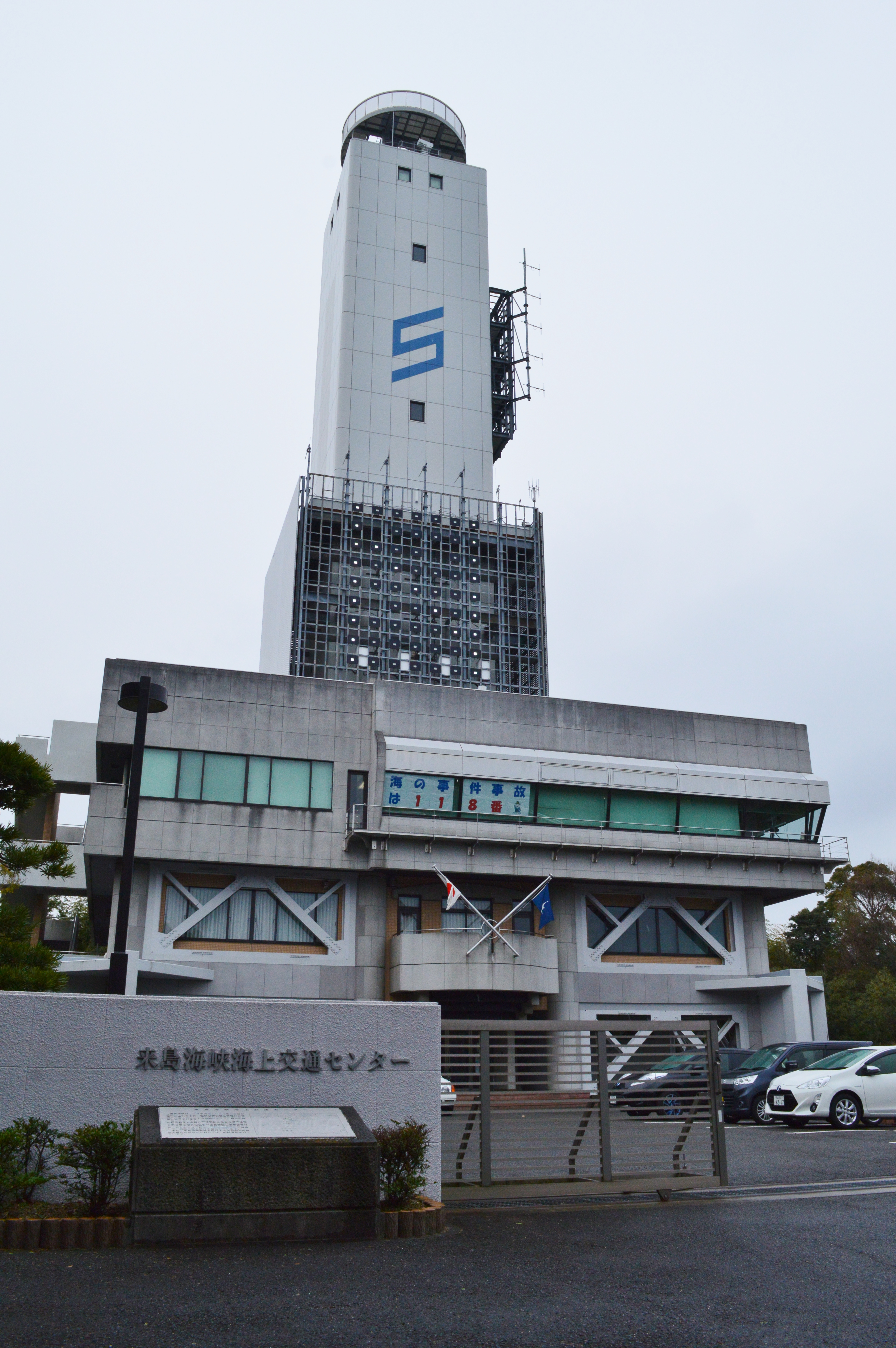 来島海峡海上交通センター 全景